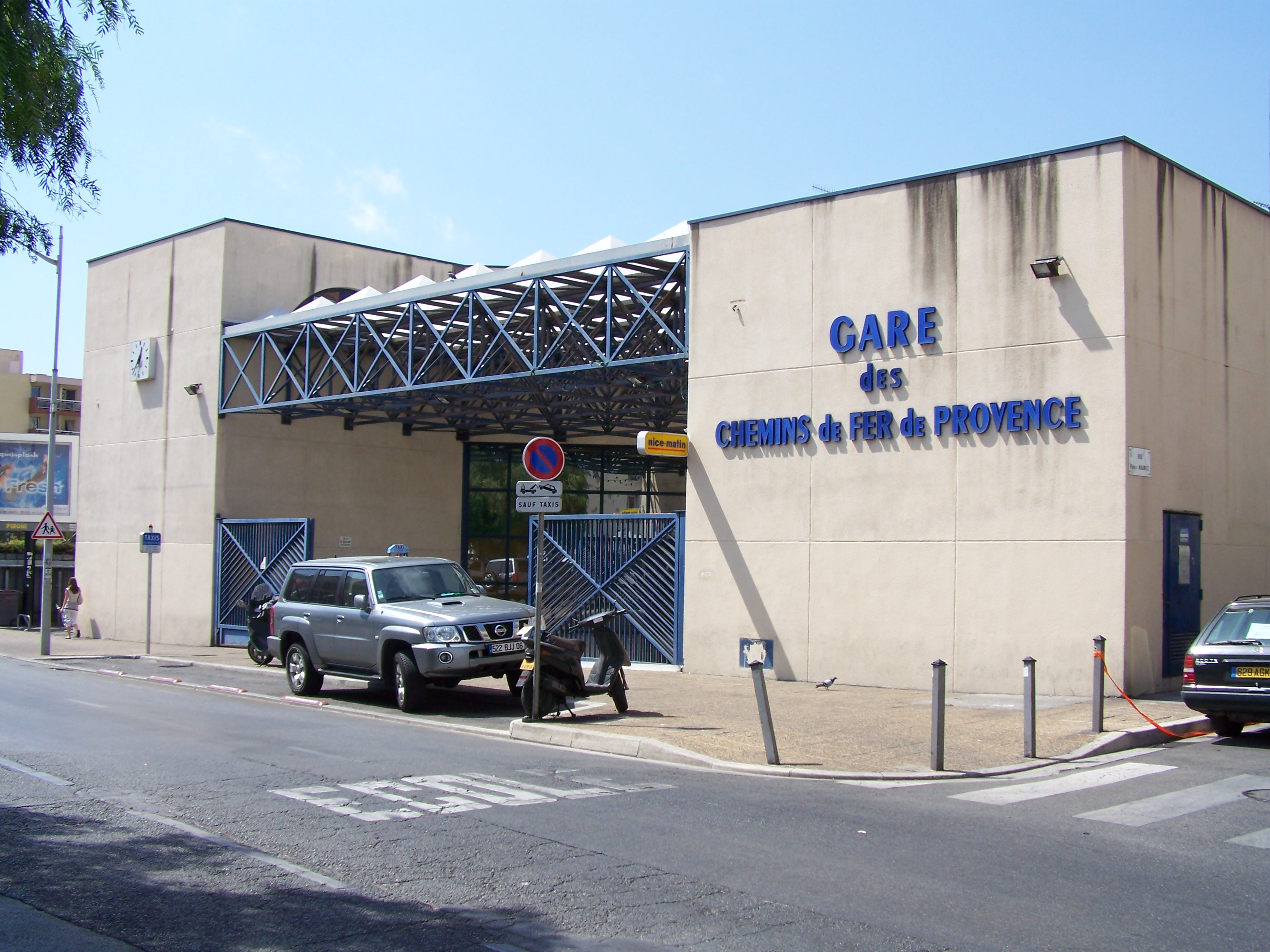 Extérieur de l'actuel terminus des Chemins de fer de Provence à Nice (Alpes-Maritimes, France).